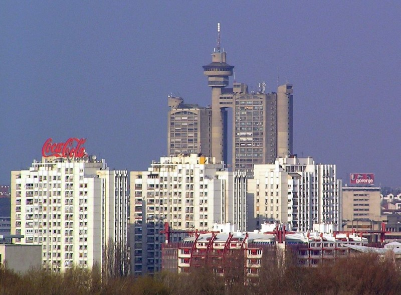 Gene Tower, Belgrade